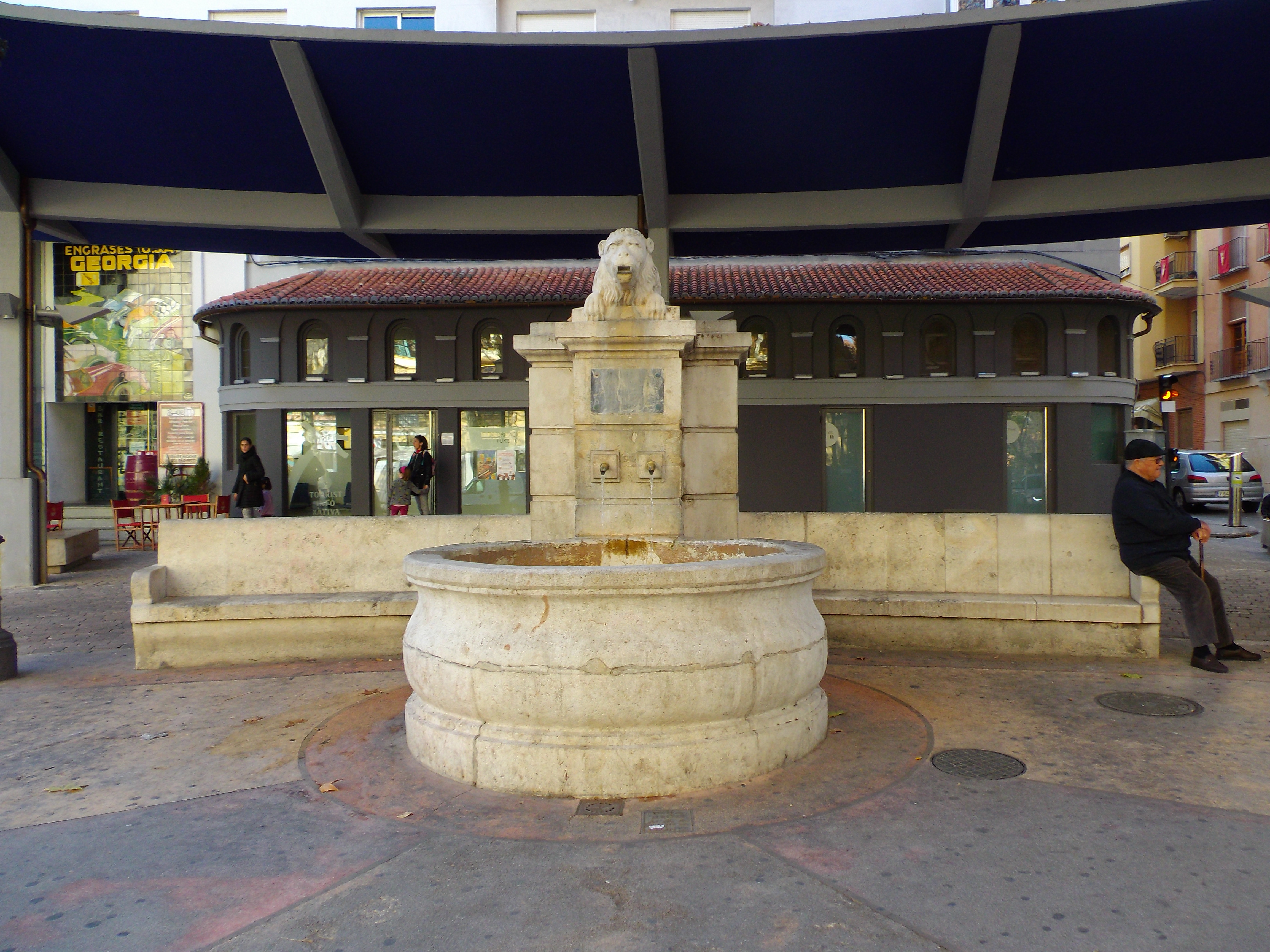 Font del Lleó de Xàtiva